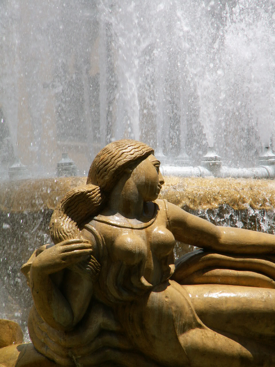 El conjunto urbanístico de El Silencio es obra del insigne arquitecto Carlos Raúl Villanueva y con más de 60 años de historia se ha convertido en simbolo de las transformaciones profundas que ha sufrido nuestro país. Las esculturas en la fuente O'Leary, en el centro del conjunto, son de Francisco Narváez. Más sobre esta importante obra de planificación urbana aquí.